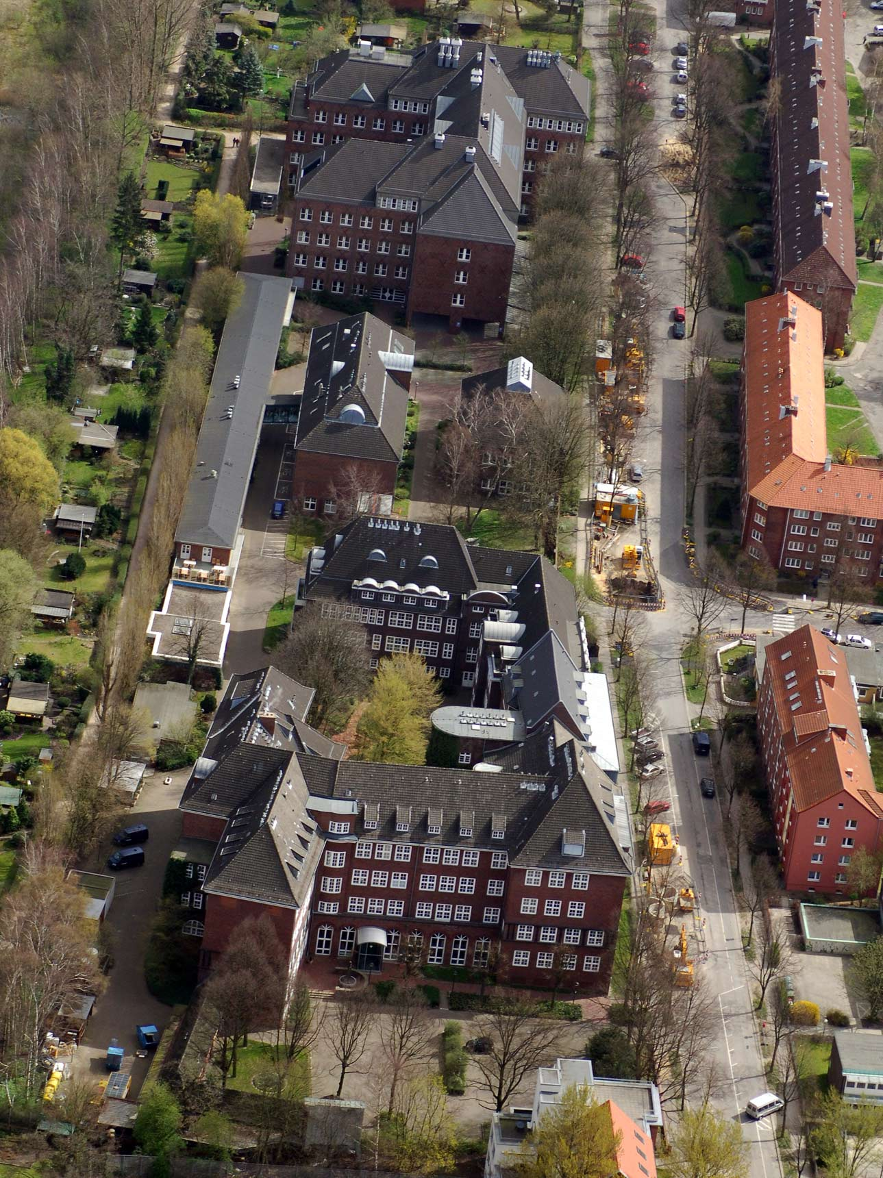 Das Institut für Hygiene und Umwelt in Hamburg-Rothenburgsort. Das östliche Gebäude beherbergte früher das Kinderkrankenhaus Rothenburgsort.